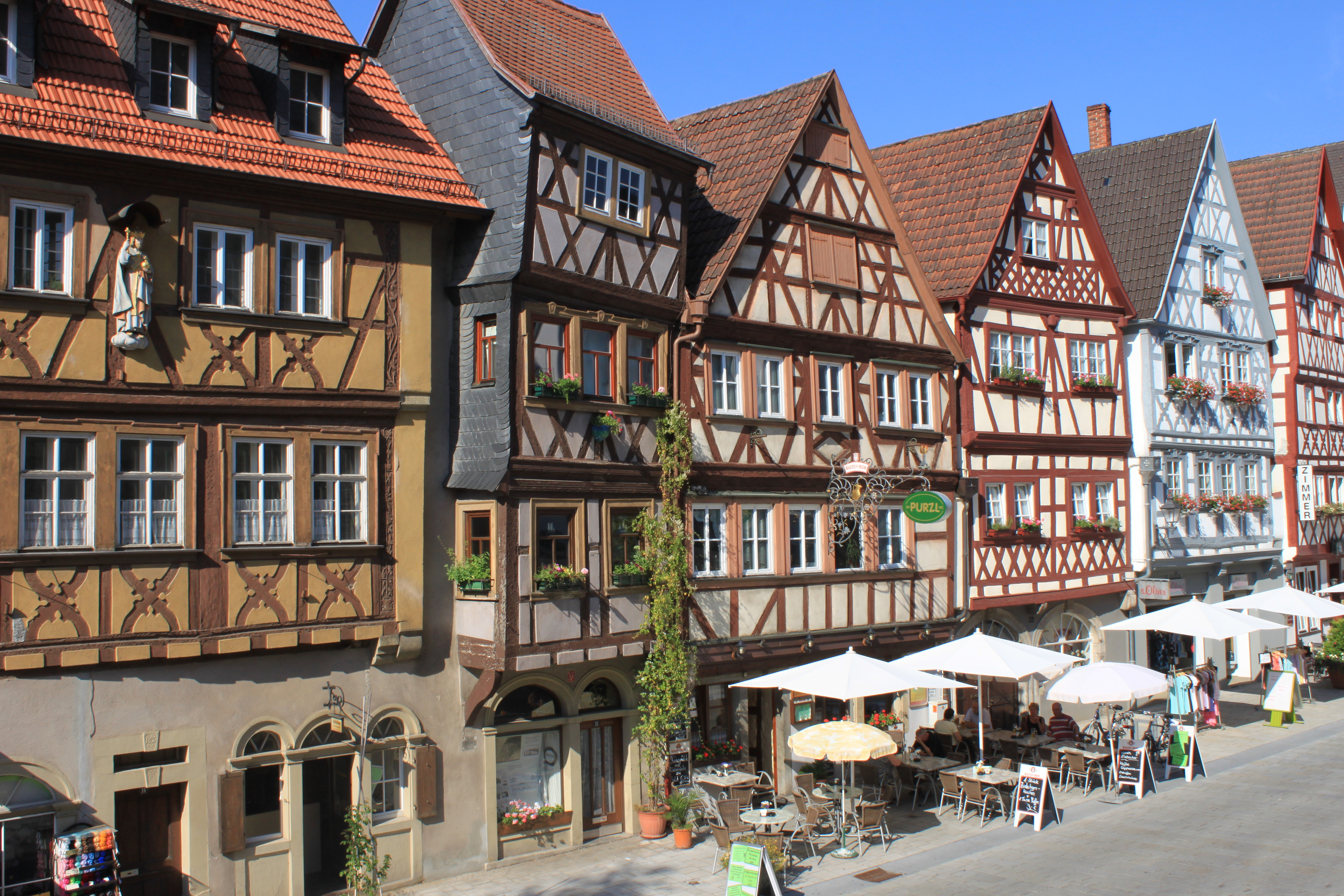 Fachwerkhauser in Ochsenfurt